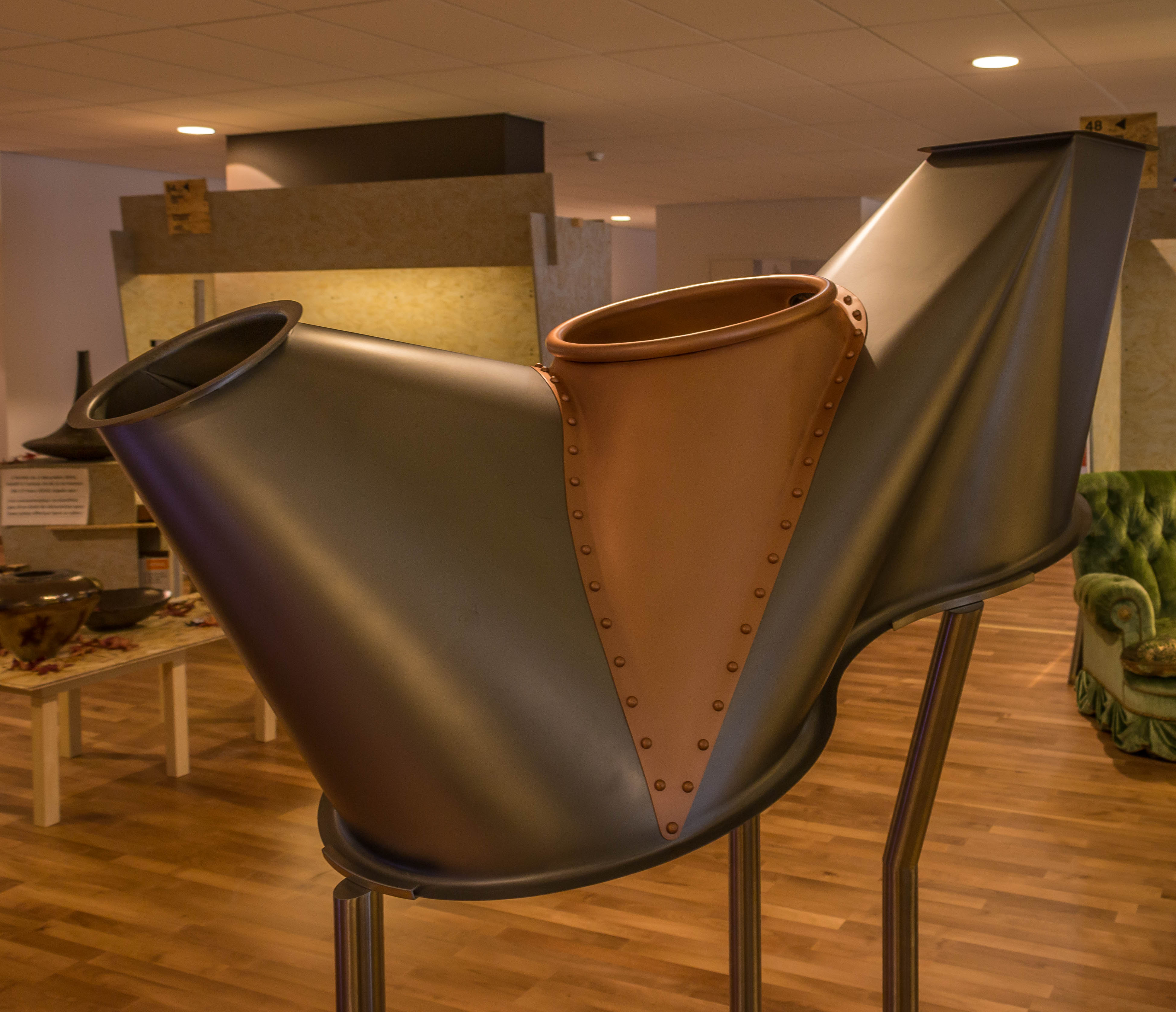 Pièce de chaudronnerie réalisée par M. Olivier Roger